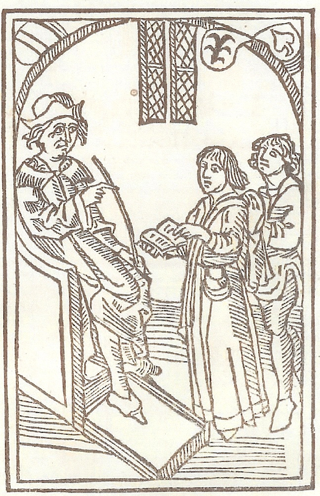 Holzschnitt 1: "Die Widmung": Ulrich Molitor mittig neben Konrad Schatz überreicht Herzog Siegmund sein Traktat.